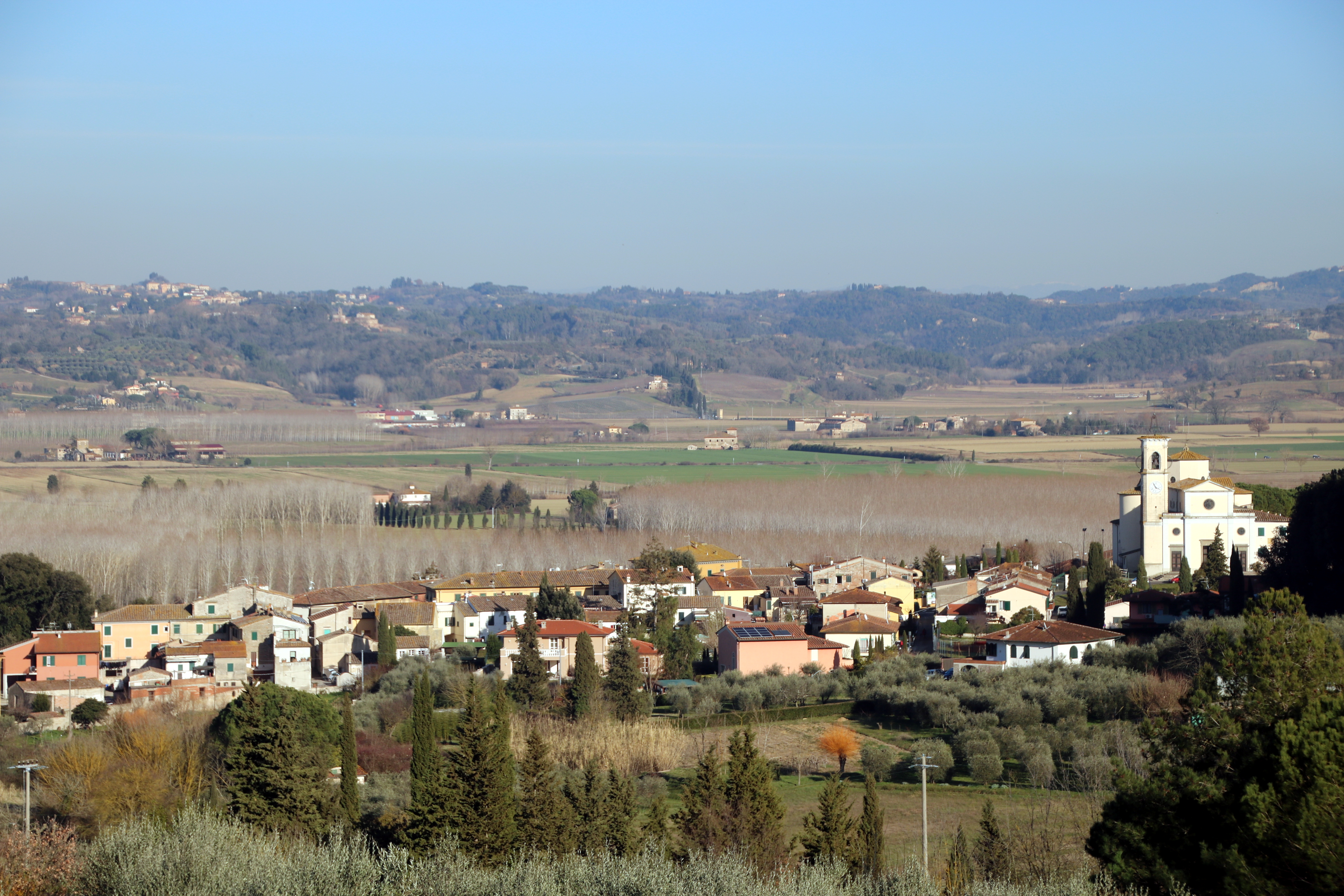 Veduta di Capannoli